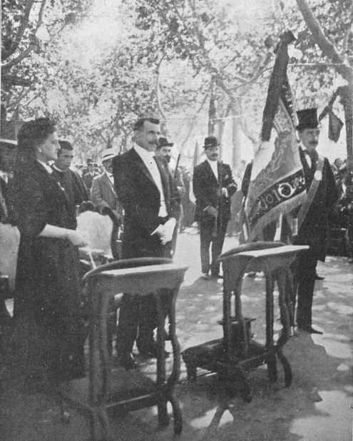 Benedicció de la bandera del Somatent al Passeig del Firal de dita ciutat. La Senyora Casabó Viuda de Vayreda y el diputat a Corts D. Pere Lloses, padrins y D. Francisco Soler, abanderado.